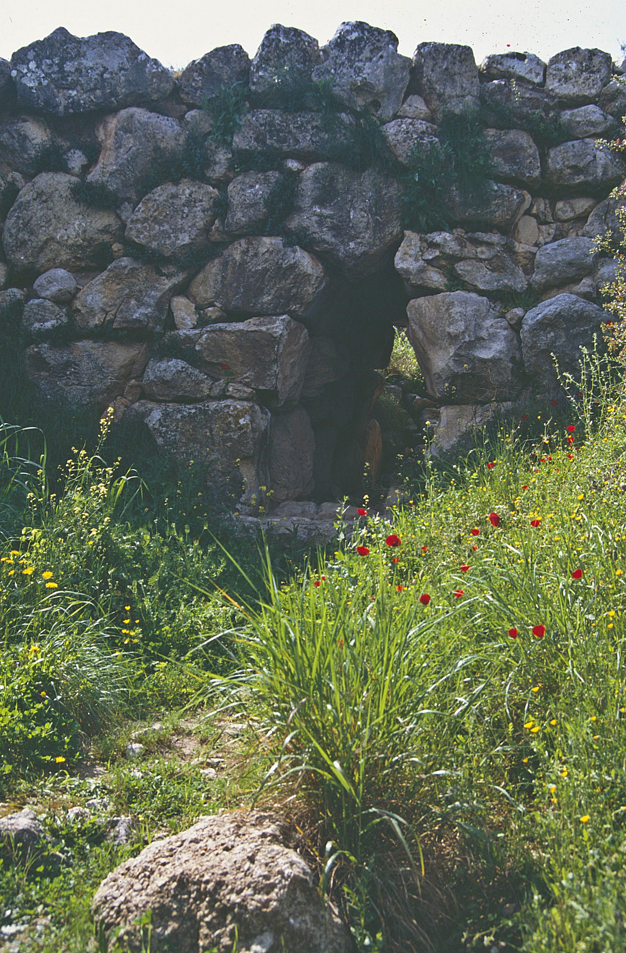 mykenische Brücke bei Ligourio/Peloponnes